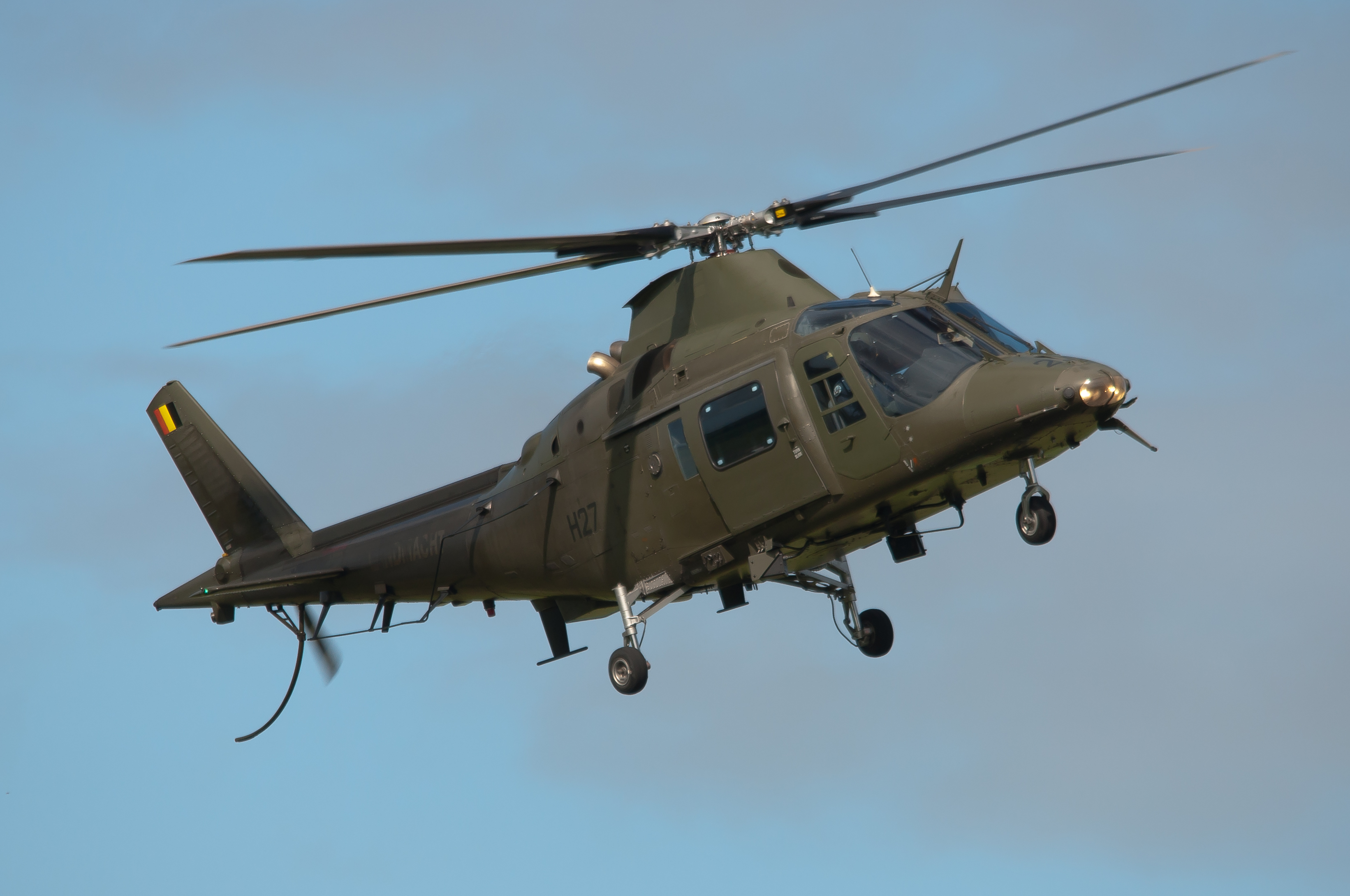 Belgium Air Force A-109 at Leeuwarden